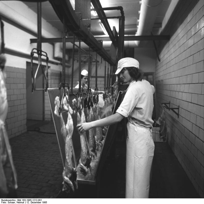 Betrieb Geflügelschlacht- und verarbeitung Schleusingen ADN-ZB Schaar 12.12.85 Bez. Suhl: Festtagsbraten 2230 Kaninchen - vorwiegend aus privaten Hauswirtschaften - werden täglich im VEB Thüringer Fleischkombinat, Betrieb Geflügelschlacht- und verarbeitung Schleusingen, geschlachtet, verpackt und an Geschäfte oder Kühlhäuser geliefert. Derzeit ist wegen der Festtagsversorgung Hochbetrieb an den Schlachtstrecken des betriebes. Karin Kleinschmidt wäscht die ausgenommenen Kaninchen.